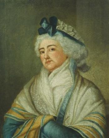 Баронесса Елизавета Михайловна Черкасова, ур. Белосельская (1742—1807)